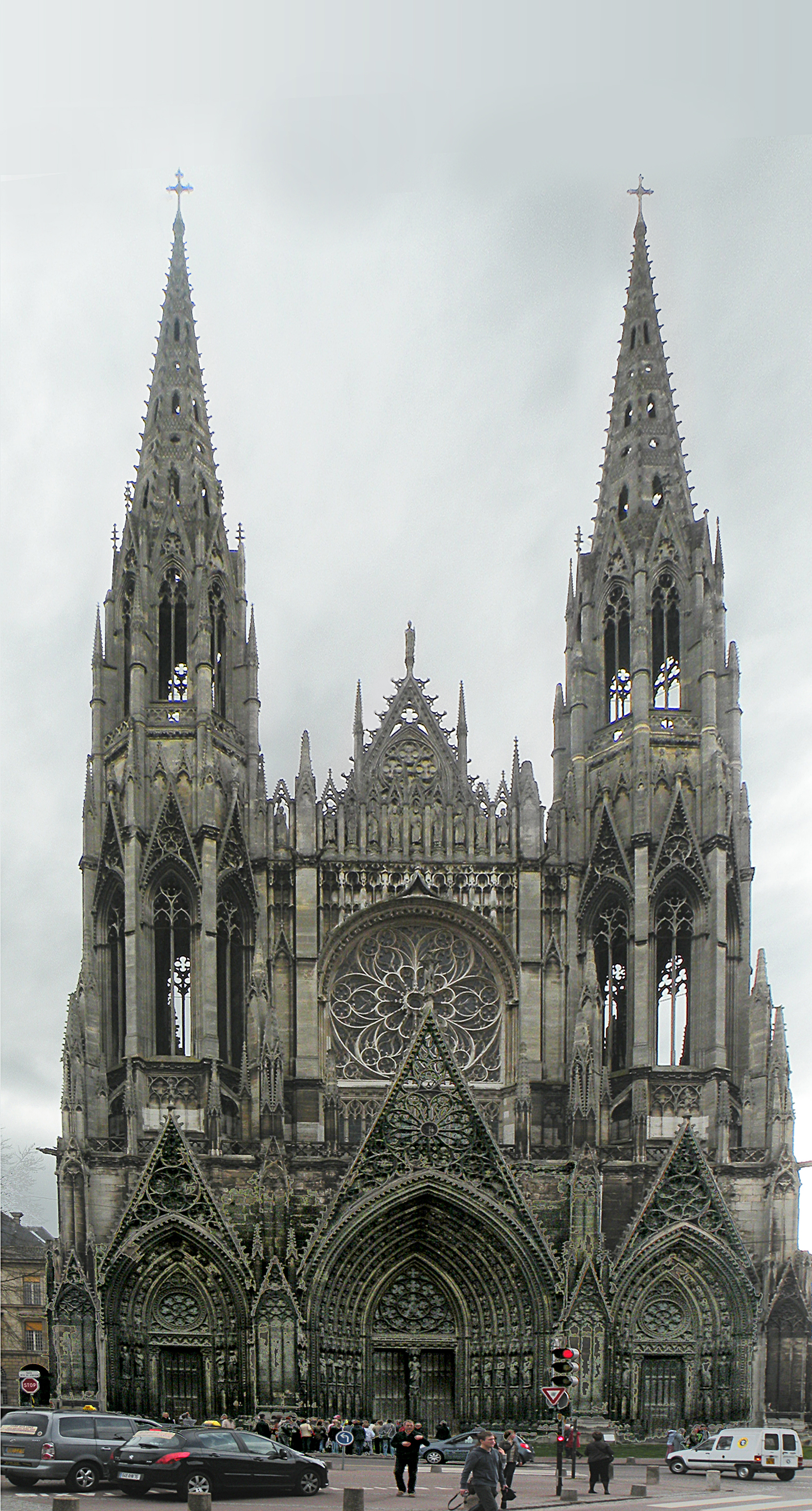 Church_Saint_Ouen. Rouen